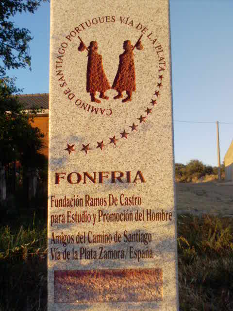 Monolito indicativo